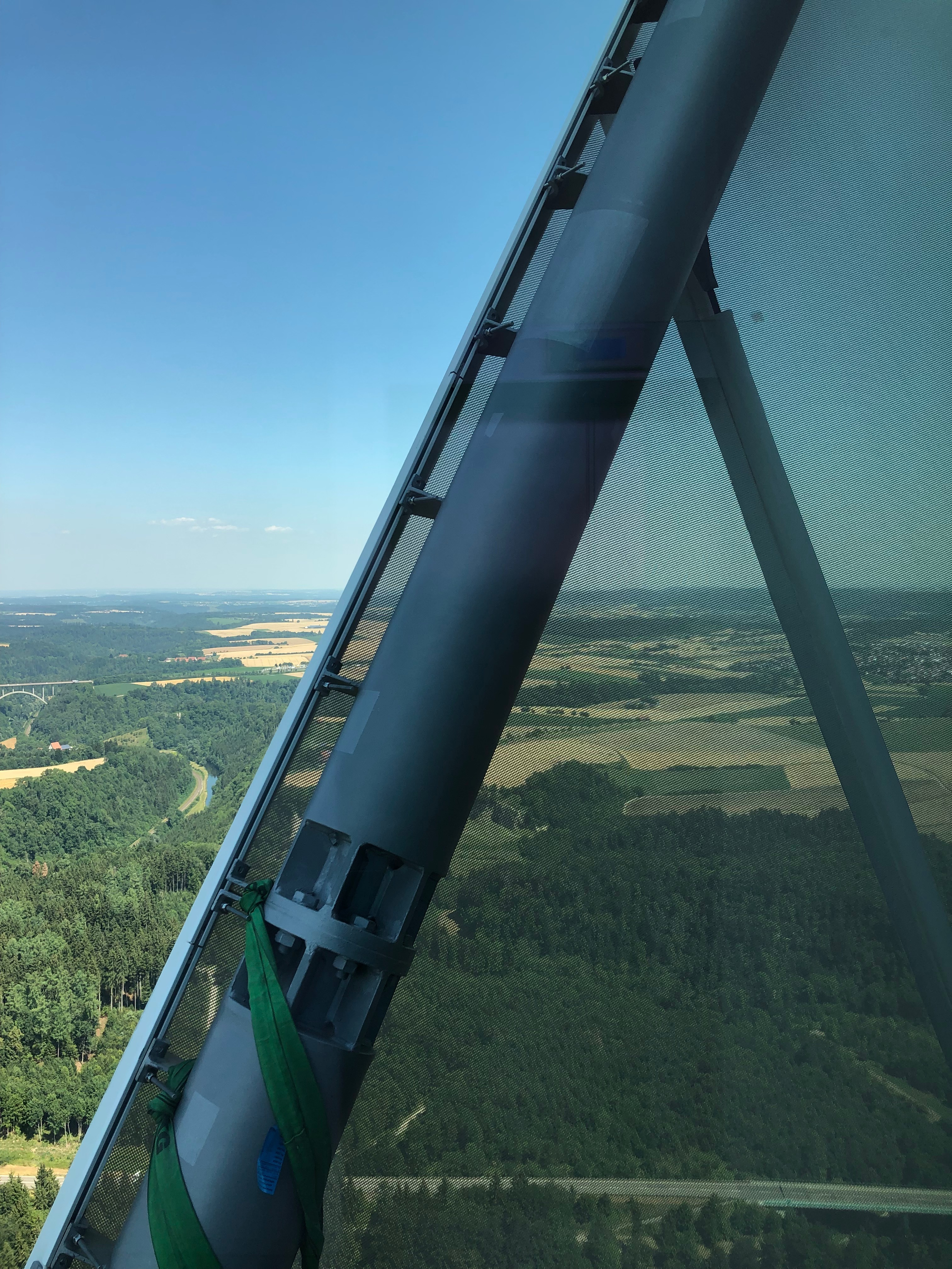 Sicht von der Aussichtsplattform des Thyssenkrupp-Testturms in Rottweil. Zu sehen ist der Rand der den ganzen Turm umgebenden Fassadenmembran.